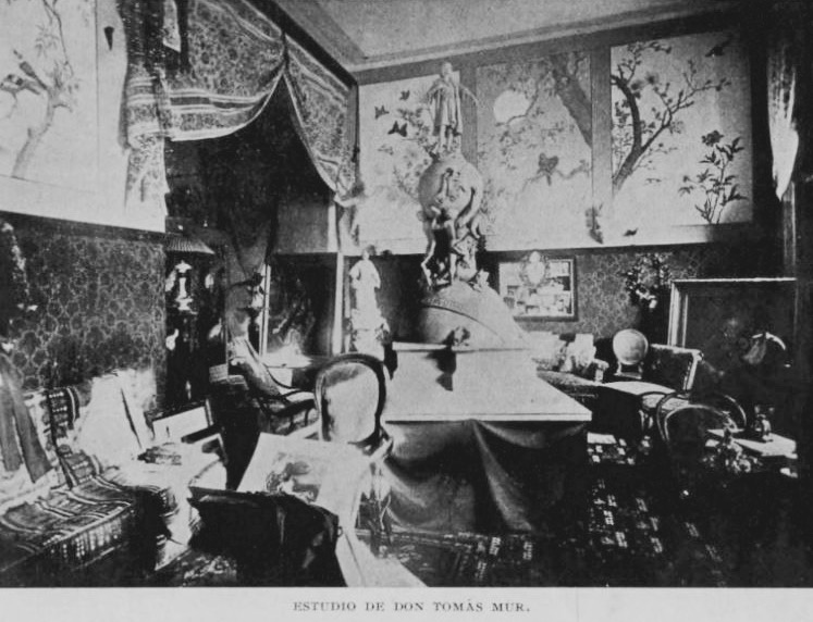 Estudio del maestro Tomás Mur en Guatemala en 1898.